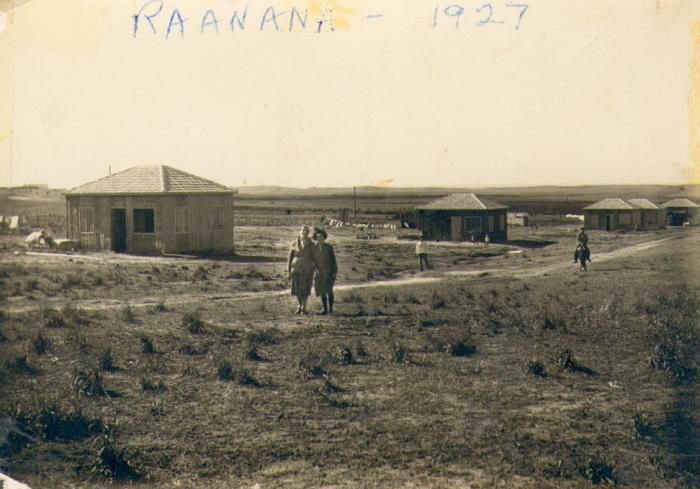 צריפים ברחוב אחוזה - מערב